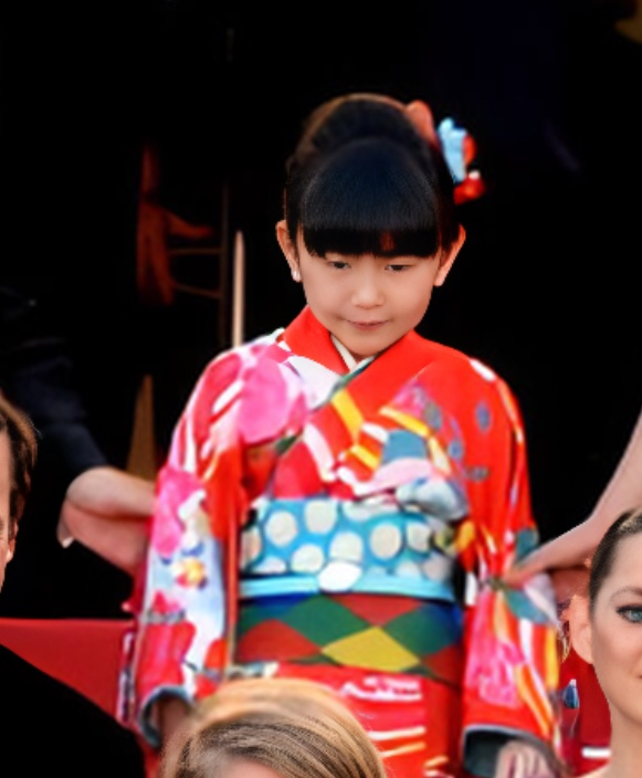 L'équipe du fillm "Le Petit prince" au festival de Cannes